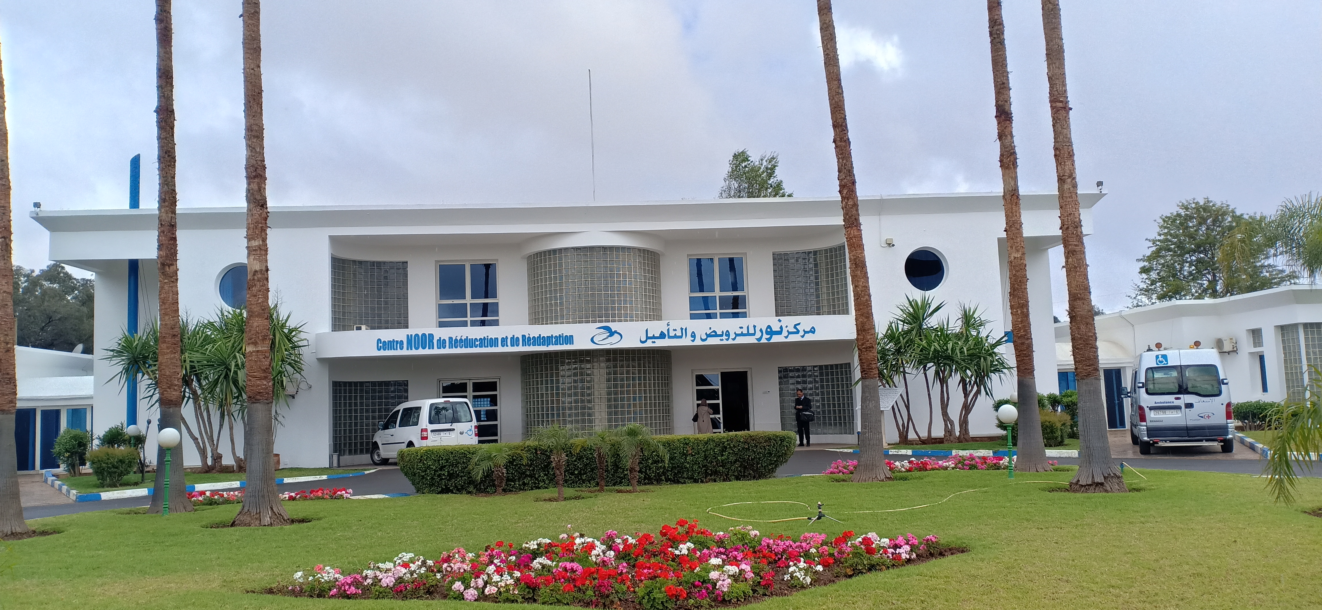 Le Groupe AMH a créé le Centre Hospitalier Noor de Rééducation et de Réadaptation à Bouskoura. Inauguré par sa majesté le Roi Mohamed VI en 2001